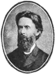 portret Adama Bełcikowskiego z książki "Upominek. Książka zbiorowa na cześć Elizy Orzeszkowej (1866-1891)"